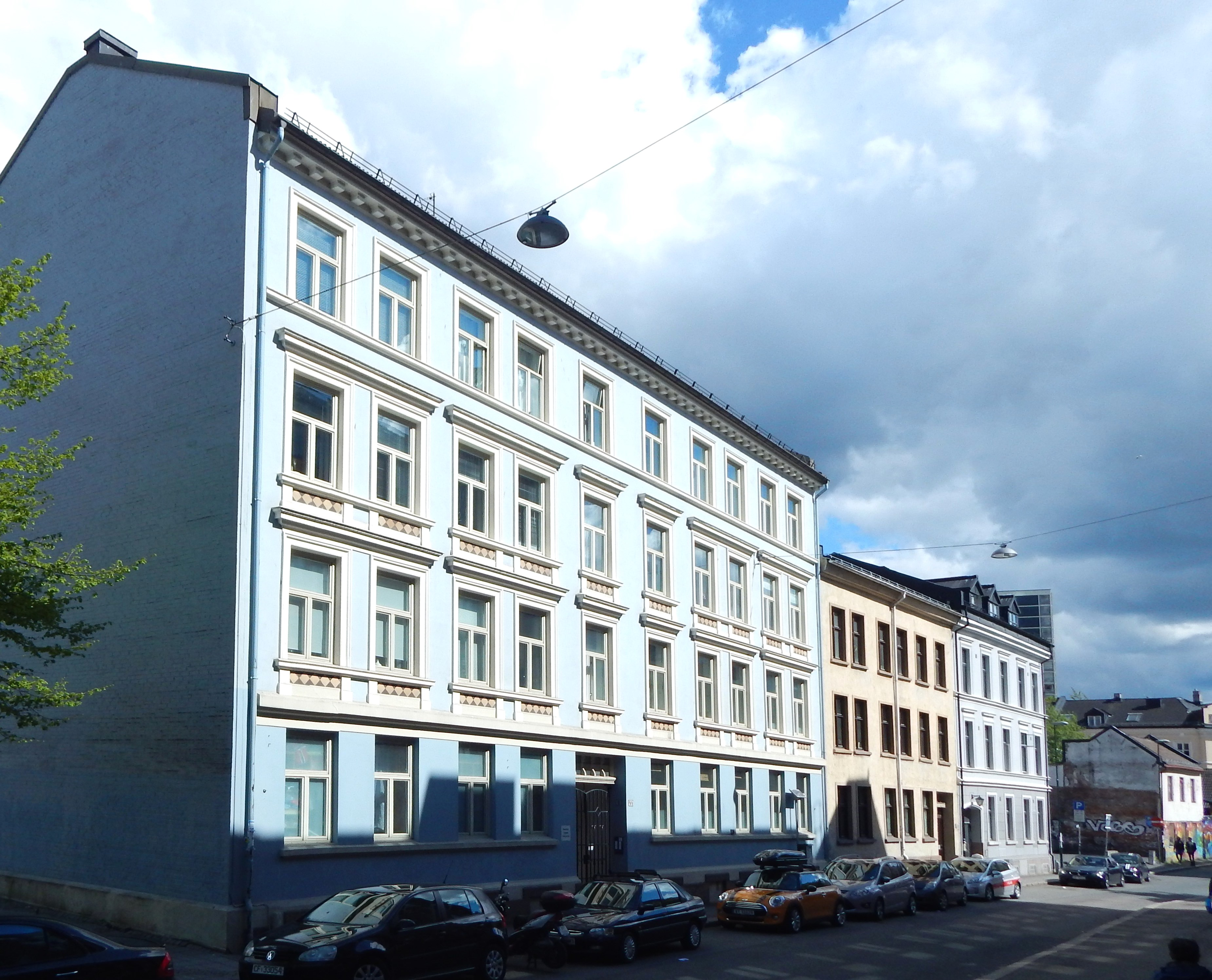 Norbygata ved nr. 44